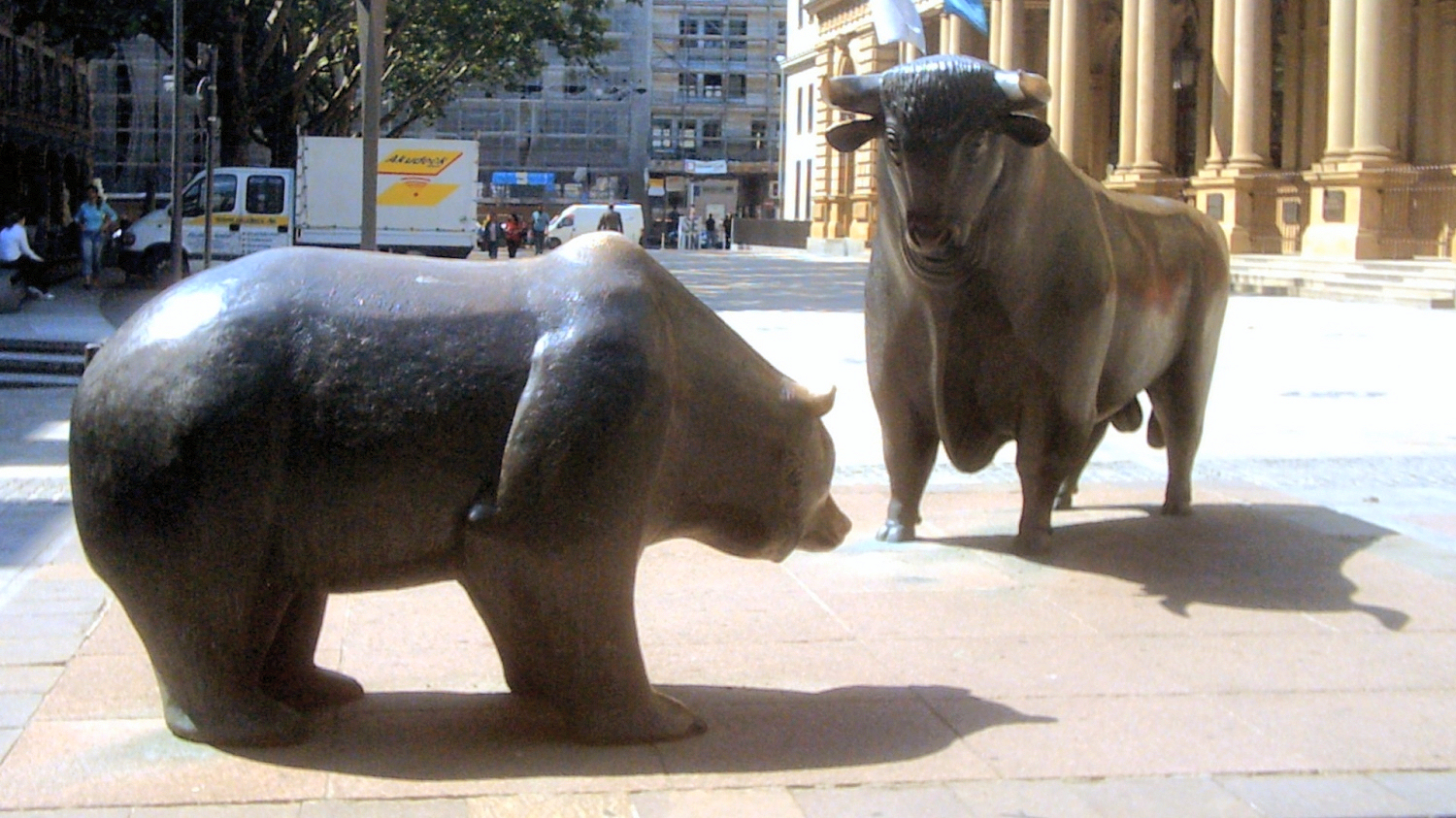 Bearbeitete Version von Image:Bull_and_bear.jpg